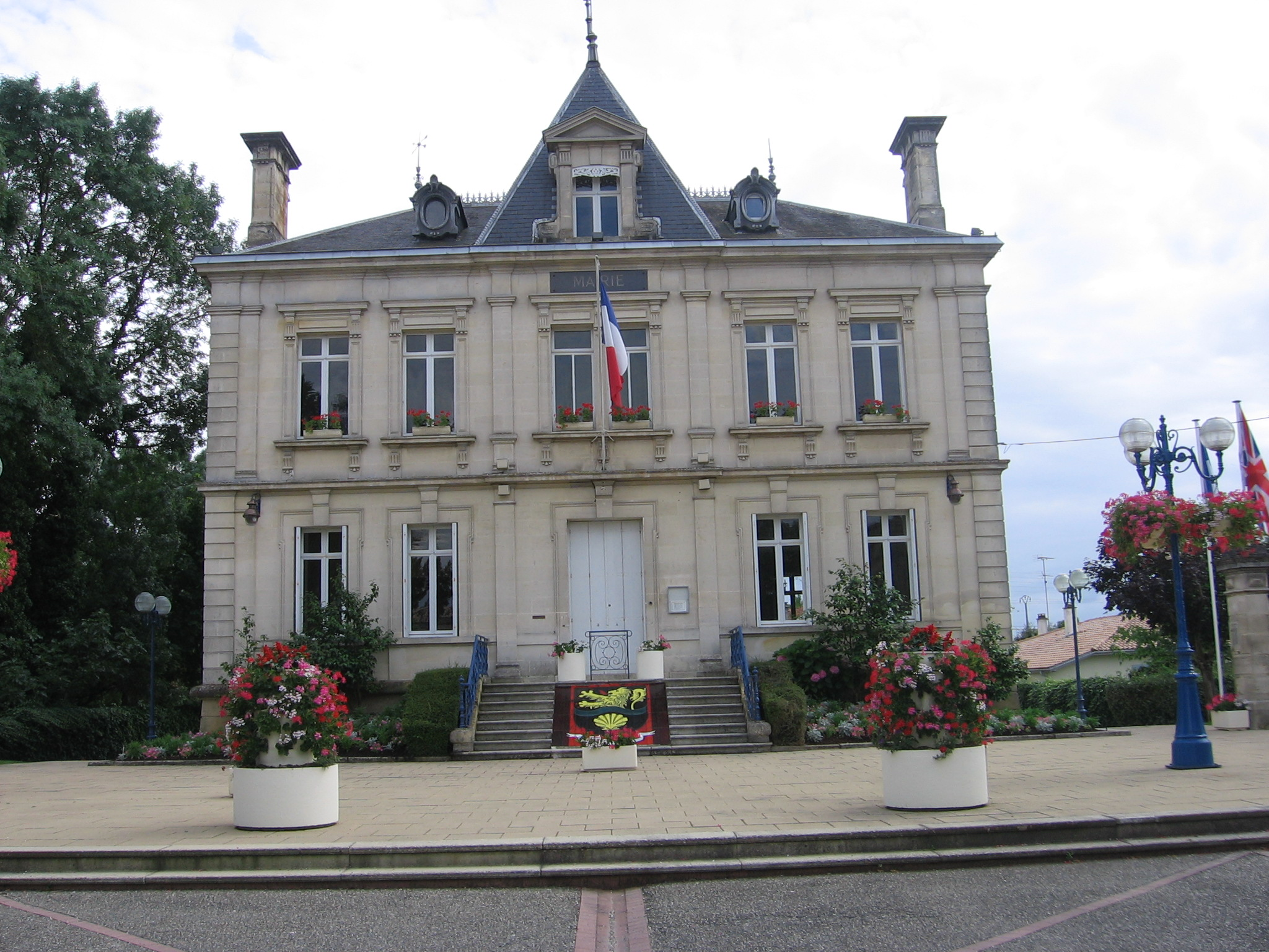 La mairie, situé dans le centre ville